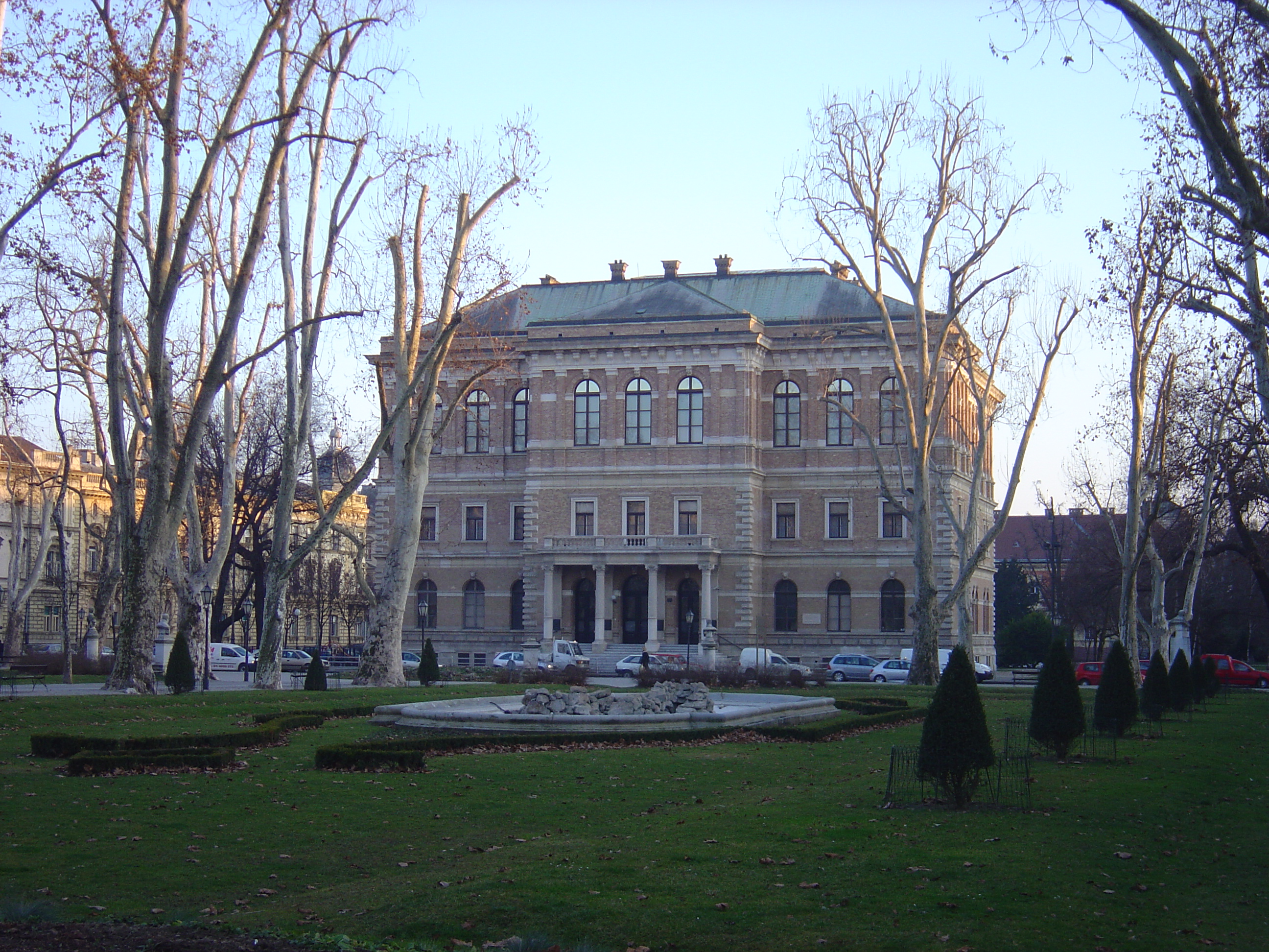 Zagreb, Croatia